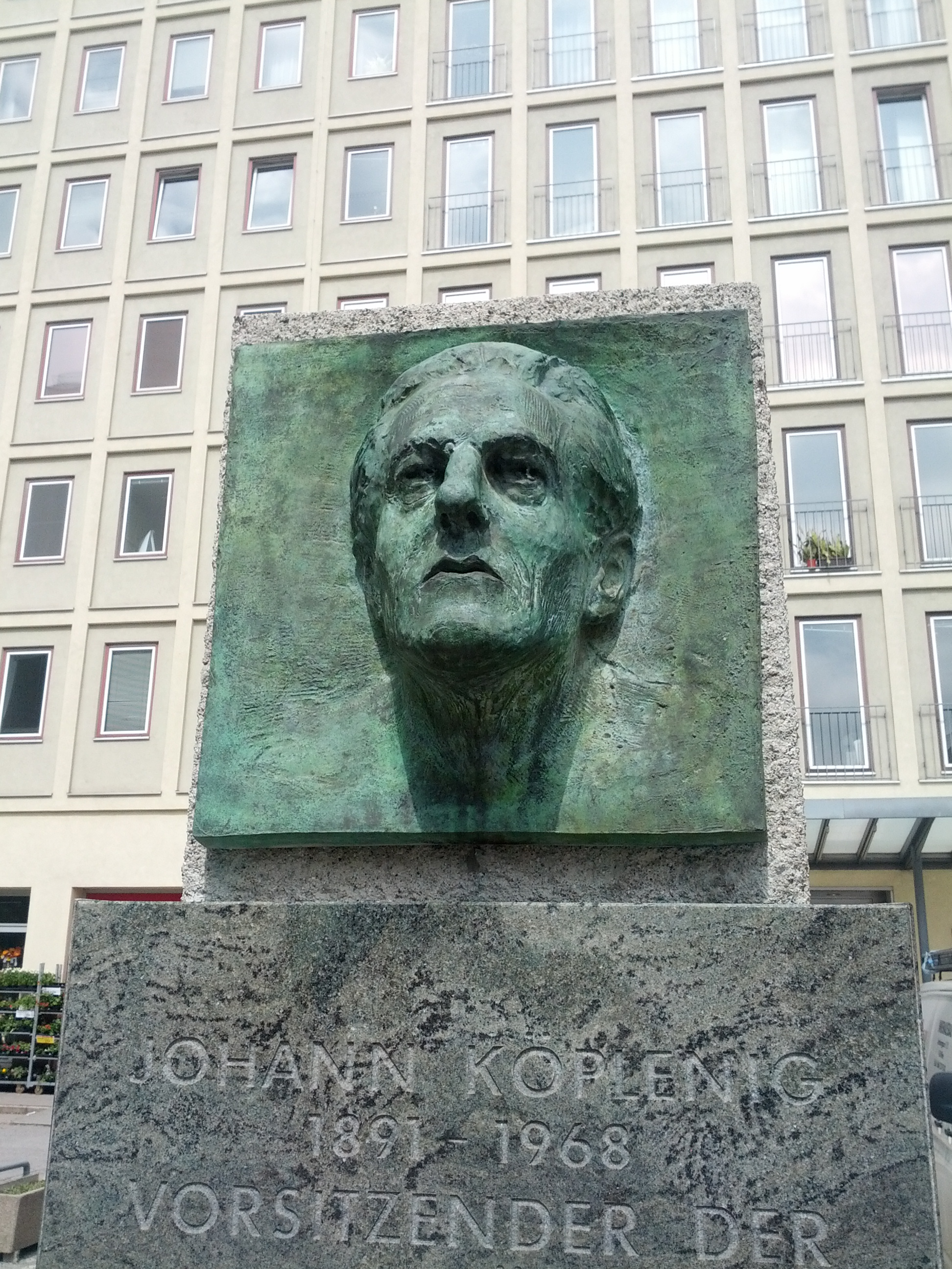 Johann Koplenig Denkmal, Höchstättplatz